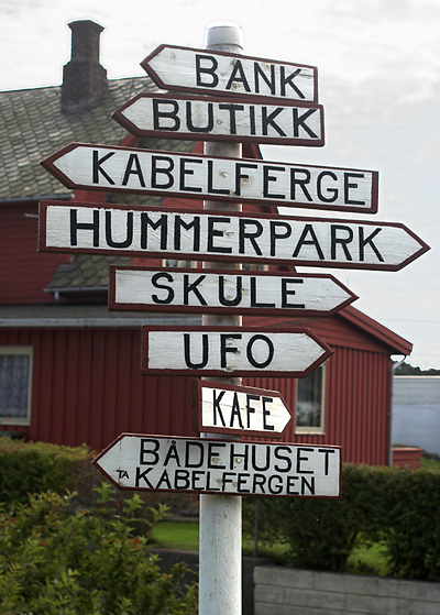 Vegvisar, Espevær